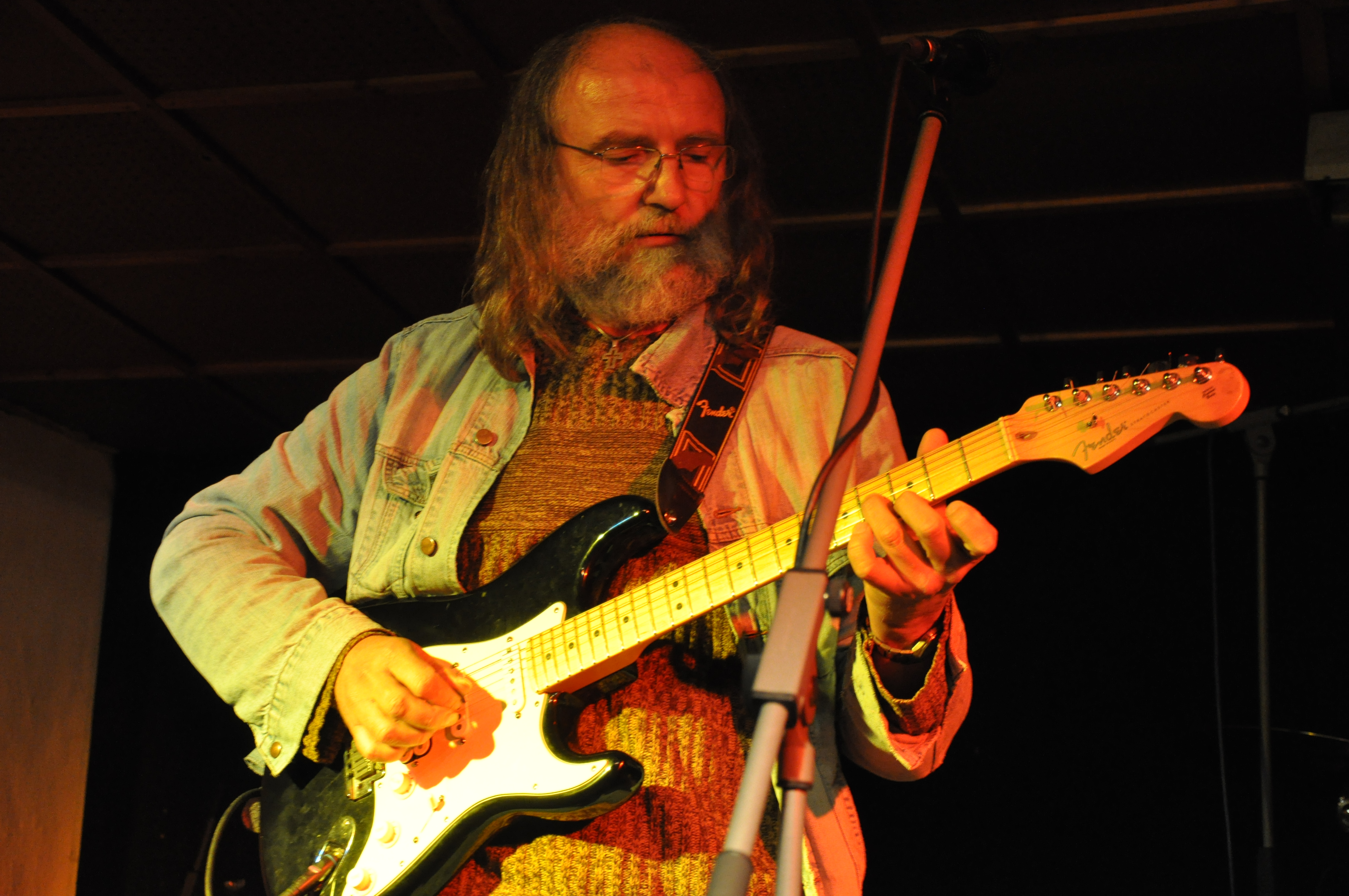 Oboroh na festivalu Otevřeno Jimramov 2009